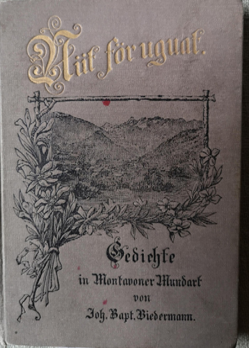 Buchdeckel "Nüt för uguat"